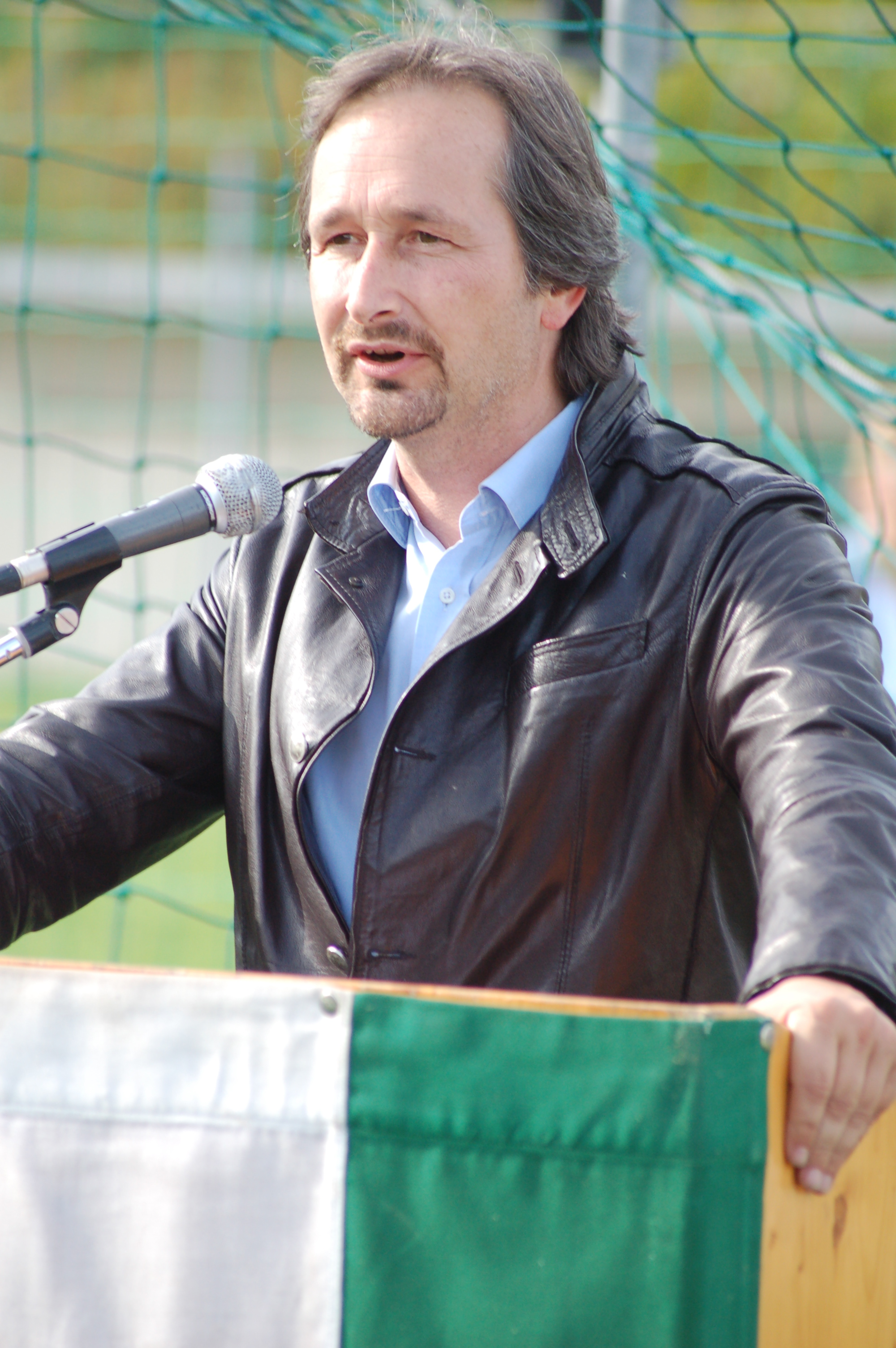 LR Wolfgang Schantl während einer Rede bei der Eröffnung des Kunstrasen-Platzes in Völkermarkt.